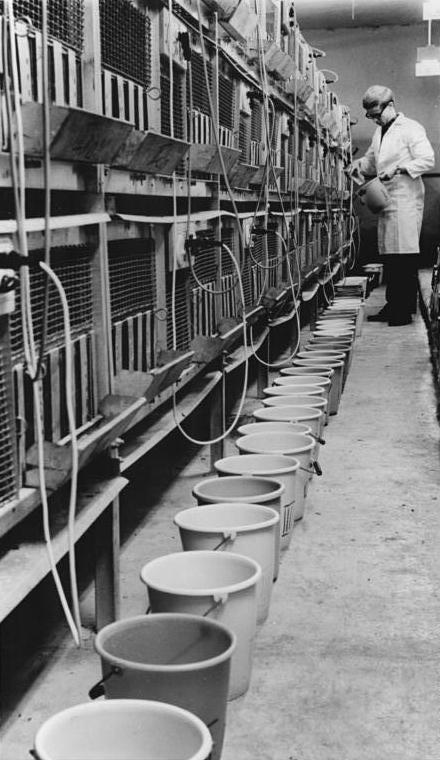 Leipzig, Universität, Veterinärmediziner Zentralbild Koch-22.1.71 Leipzig: Praxisbezogenes Studium- Mit dem optimalen Futtereinsatz bei der Tierernährung beschäftigt sich Forschungsstudent Bernhard Meixner in der Versuchsstation Remderoda. Er füttert die Broiler-Küken nach Versuchsgruppen mit verschiedenen Futtermitteln. Regelmäßige Gewichtskontrollen und Überprüfungen der geschlachteten Tiere geben Auskunft über die Futterverwertung. Es gehört zu den wesentlichen Aufgaben der Sektion Tierproduktion und Veterinärmedizin der Leipziger Karl-Marx-Universität, den optimalen Futtereinsatz zu erforschen. (Bitte beachten Sie dazu unser Foto K0122-03-1N)